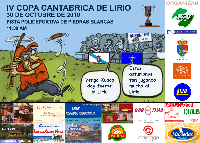 Cartel anunciador de la IV Copa Cantábrica de Liriu/Billarda